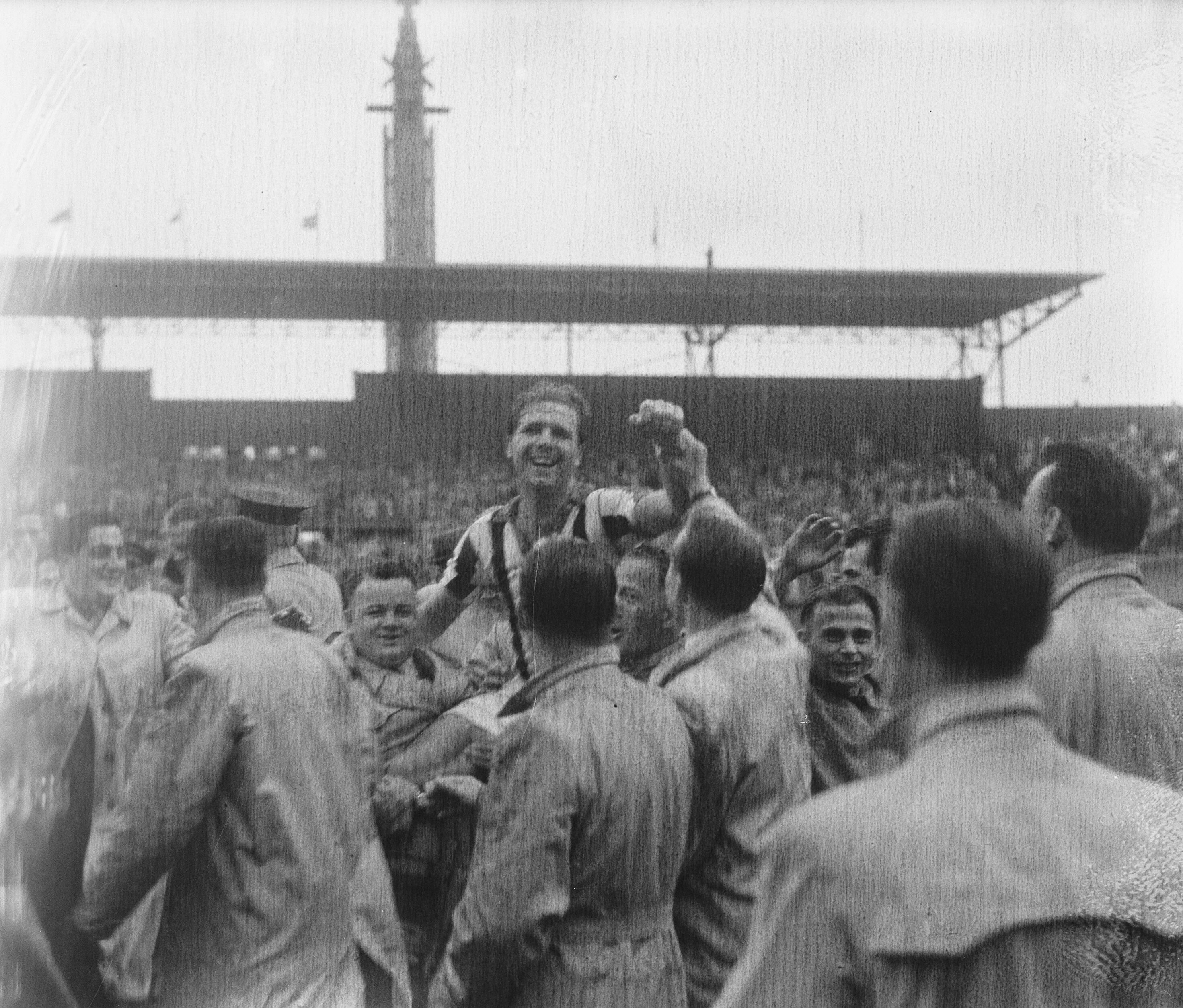 Collectie / Archief : Fotocollectie Anefo Reportage / Serie : Voetbal. Ajax-Willem II (1-2). Willem II kampioen van Nederland Beschrijving : sport, voetbal Annotatie : Willem II midvoor Jan van Roesel (?) wordt door supporters op handen gedragen Datum : 15 juni 1952 Locatie : Amsterdam, Noord-Holland Trefwoorden : sport, voetbal Instellingsnaam : Willem II Fotograaf : Consenheim, Wim / Anefo Auteursrechthebbende : Nationaal Archief Materiaalsoort : Glasnegatief Nummer archiefinventaris : bekijk toegang 2.24.01.09 Bestanddeelnummer : 905-1634